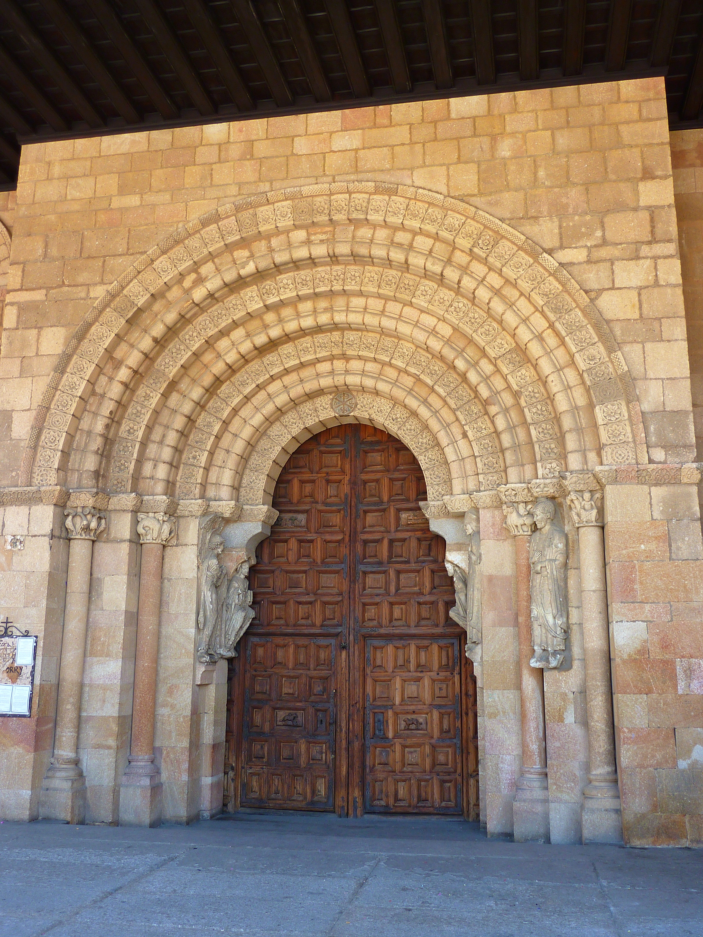 Portada sur de la basílica de San Vicente (Ávila).